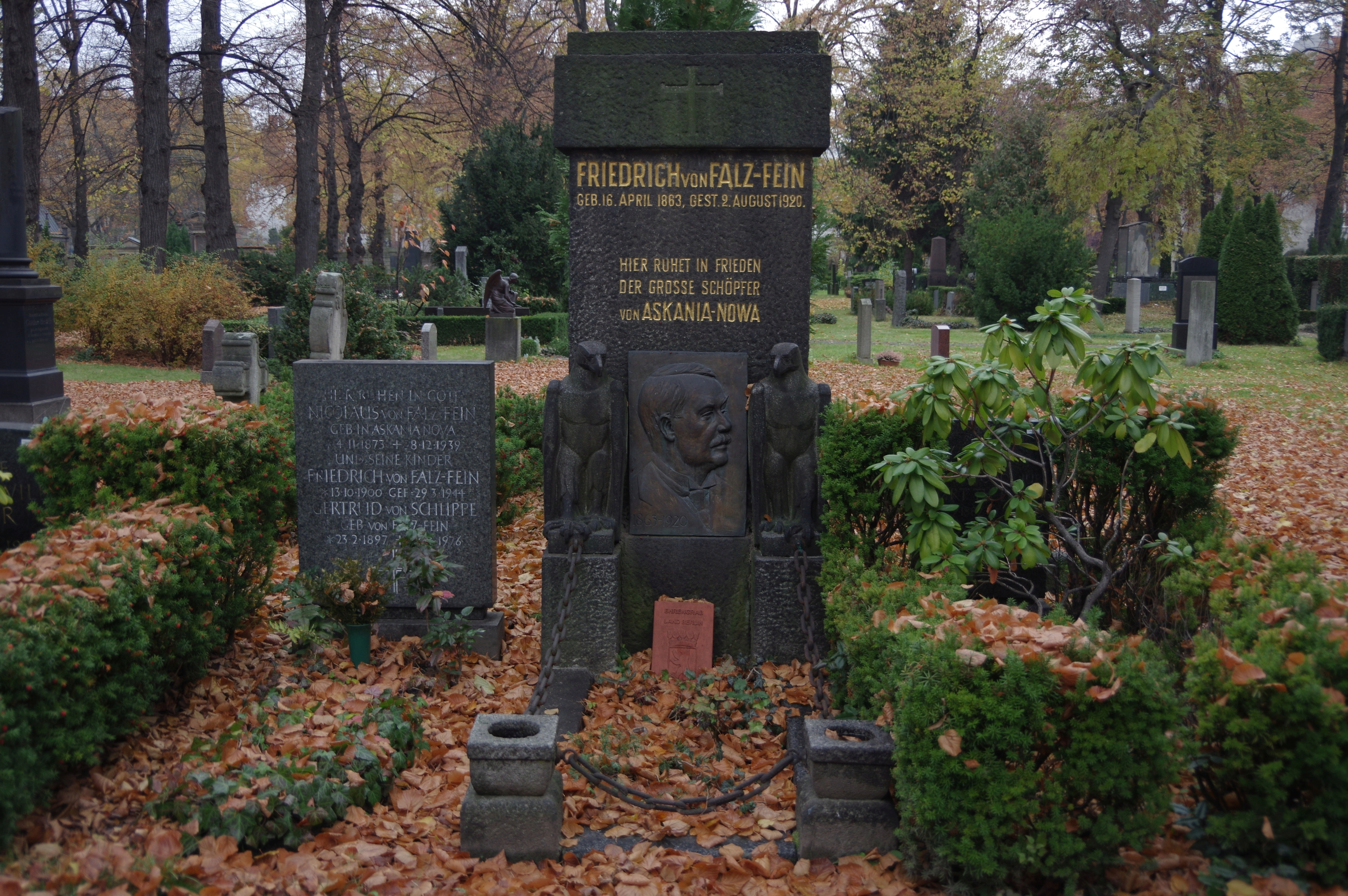 Der Alter Zwölf-Apostel-Kirchhof in Berlin-Schöneberg. Der Friedhof ist denkmalgeschützt.